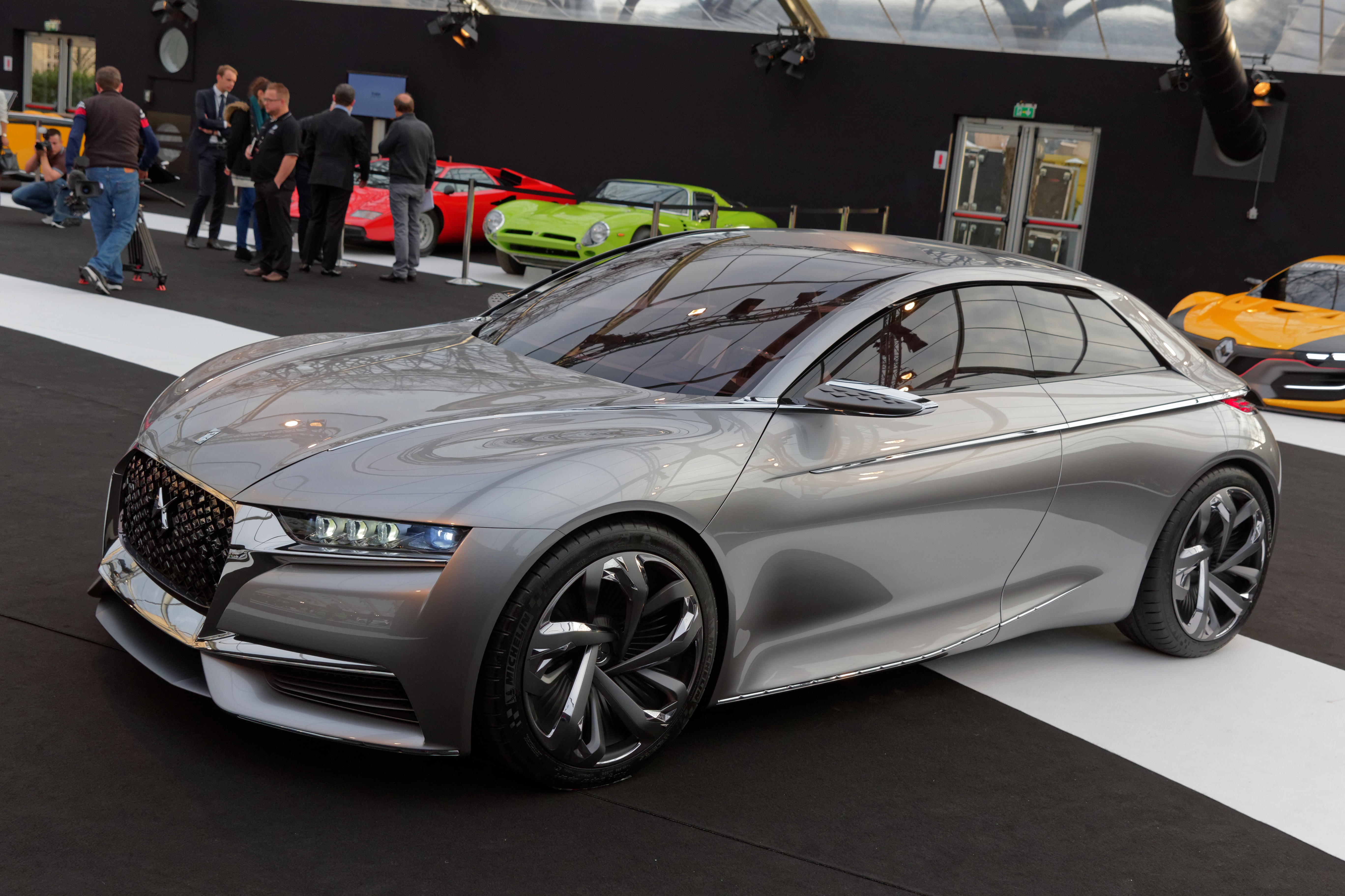 La DS Divine exposée lors du festival automobile international 2015.